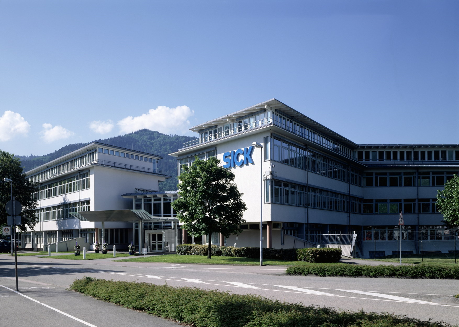 SICK AG Headquarter Waldkirch Deutschland